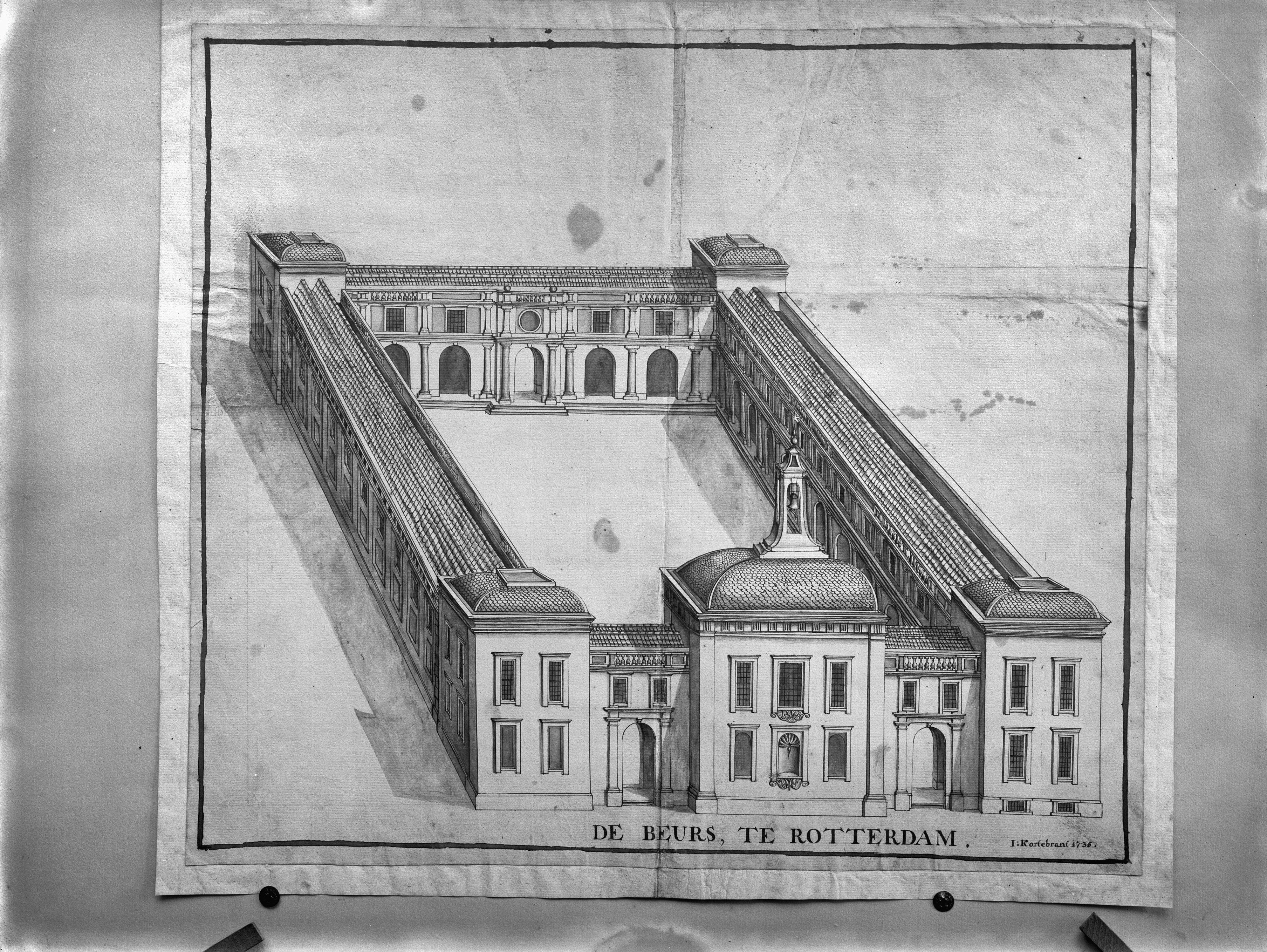 Beurs: Beurs bij voltooiing naar tekening van J.Kortebrant in het Gemeente Archief Rotterdam